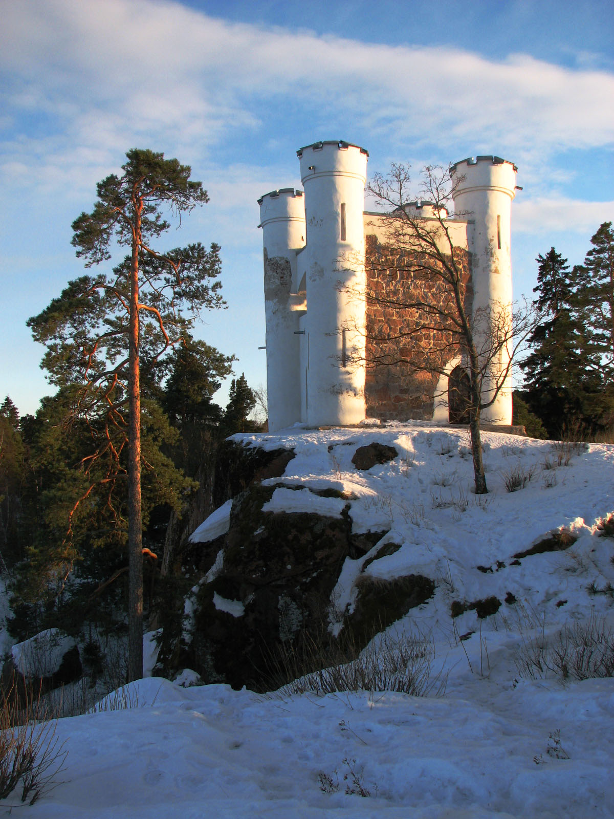 Остров Людвигштейн (Санкт-Петербург и Лен.область, Выборг, парк Монрепо)